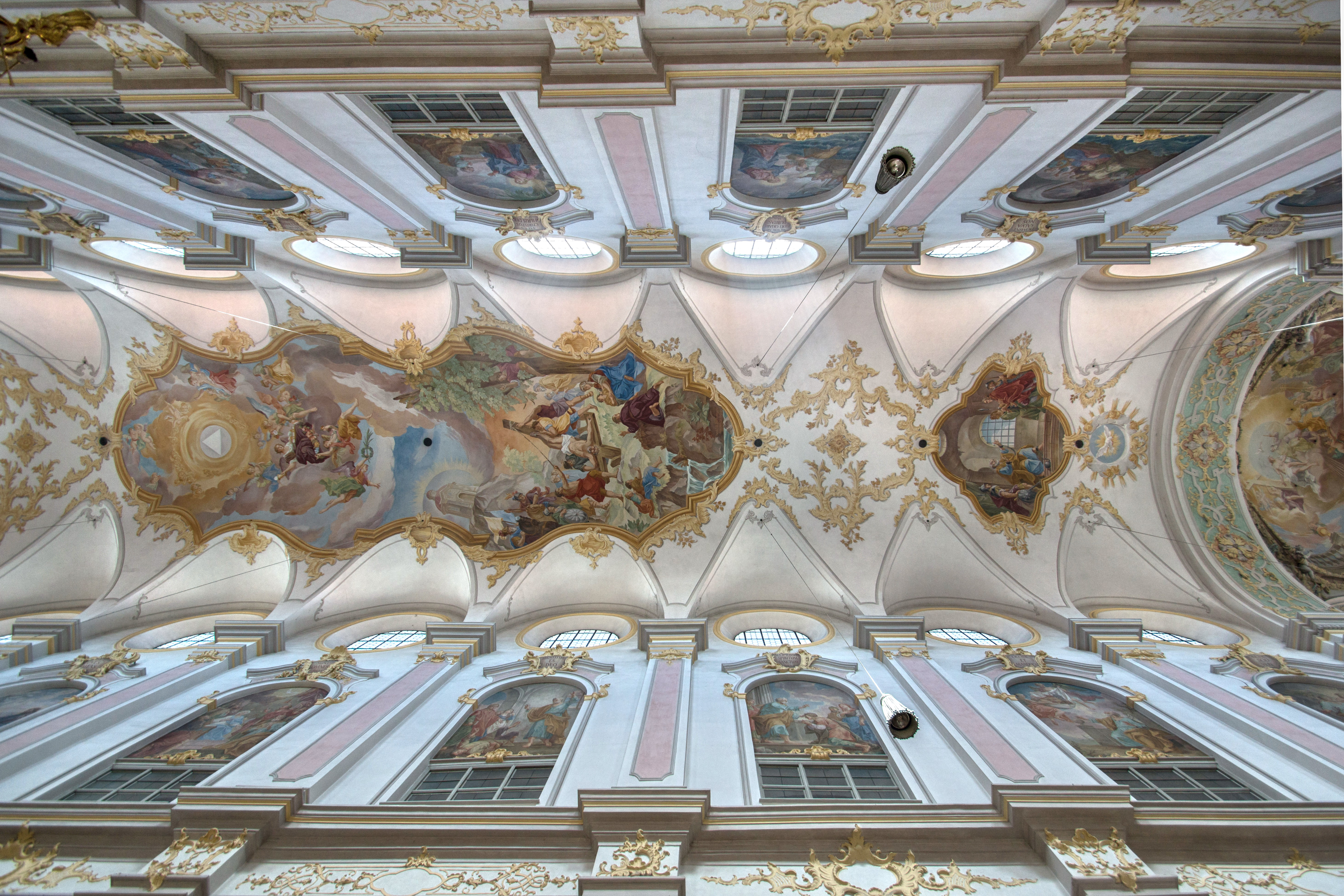 Iglesia Parroquial de San Pedro